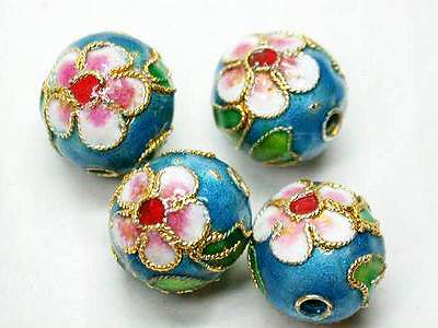 Cloisonne beads